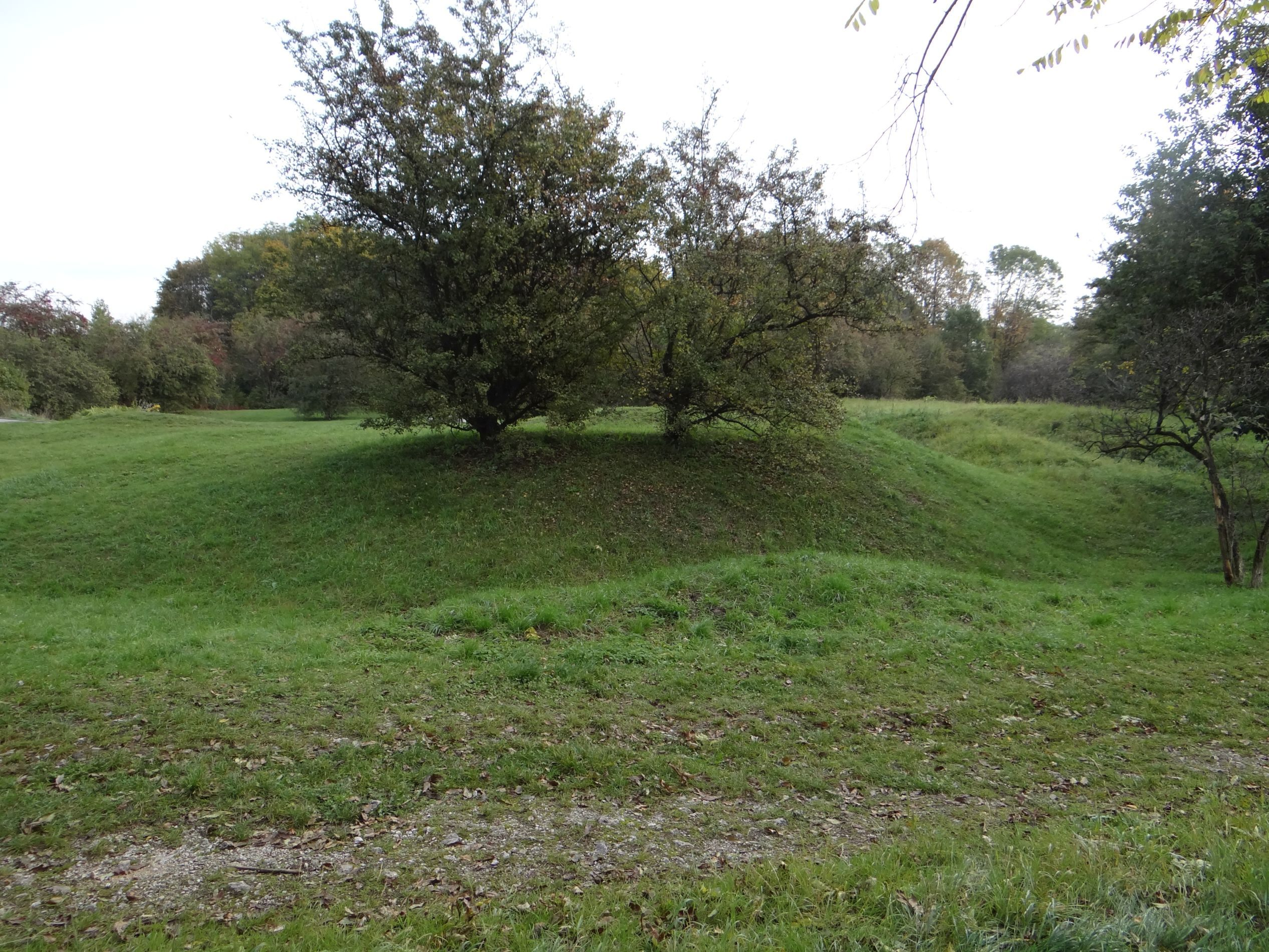 Teren dawnego szańca FS-21